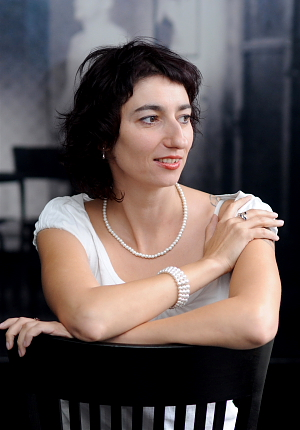 Simona Babčáková (nar. 1973) je česká herečka.